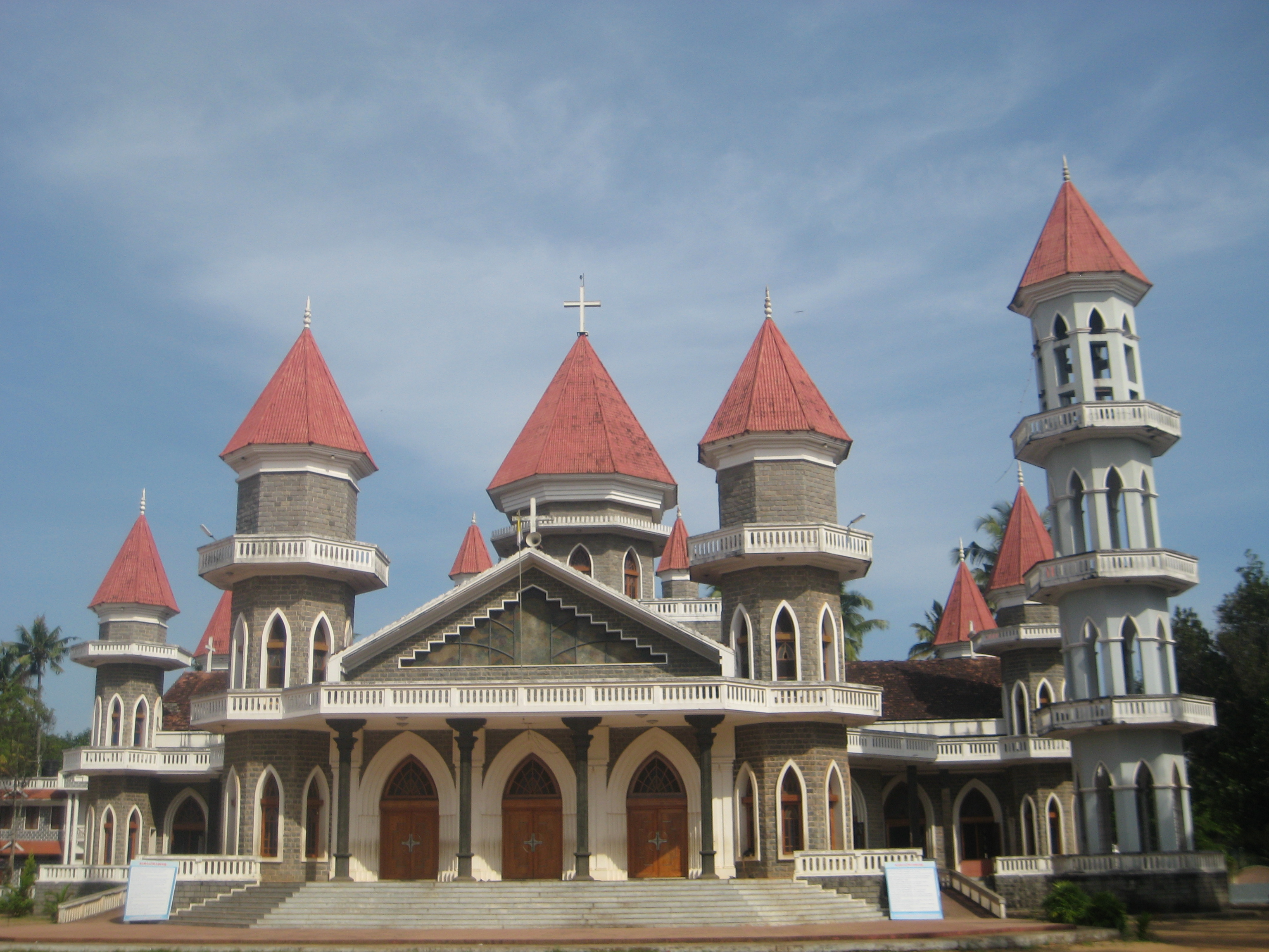 വരാപ്പുഴ അതിരൂപതയുടെ കീഴിലുള്ള ലത്തീൻ റീത്തിലുള്ള കോട്ടപ്പുറം രൂപതയുടെ ആസ്ഥാനപള്ളിയാണ് സെന്റ് മൈക്കിൾസ് കത്തീഡ്രൽ പള്ളി. 1987 ലാണ് കോട്ടപ്പുറം രൂപത നിലവിൽ വന്നത്. ത്രീശ്ശൂർ ജില്ലയിലെ കോട്ടപ്പുറം പട്ടണത്തിലാണ് ഈ പള്ളി സ്ഥിതി ചെയ്യുന്നത്.